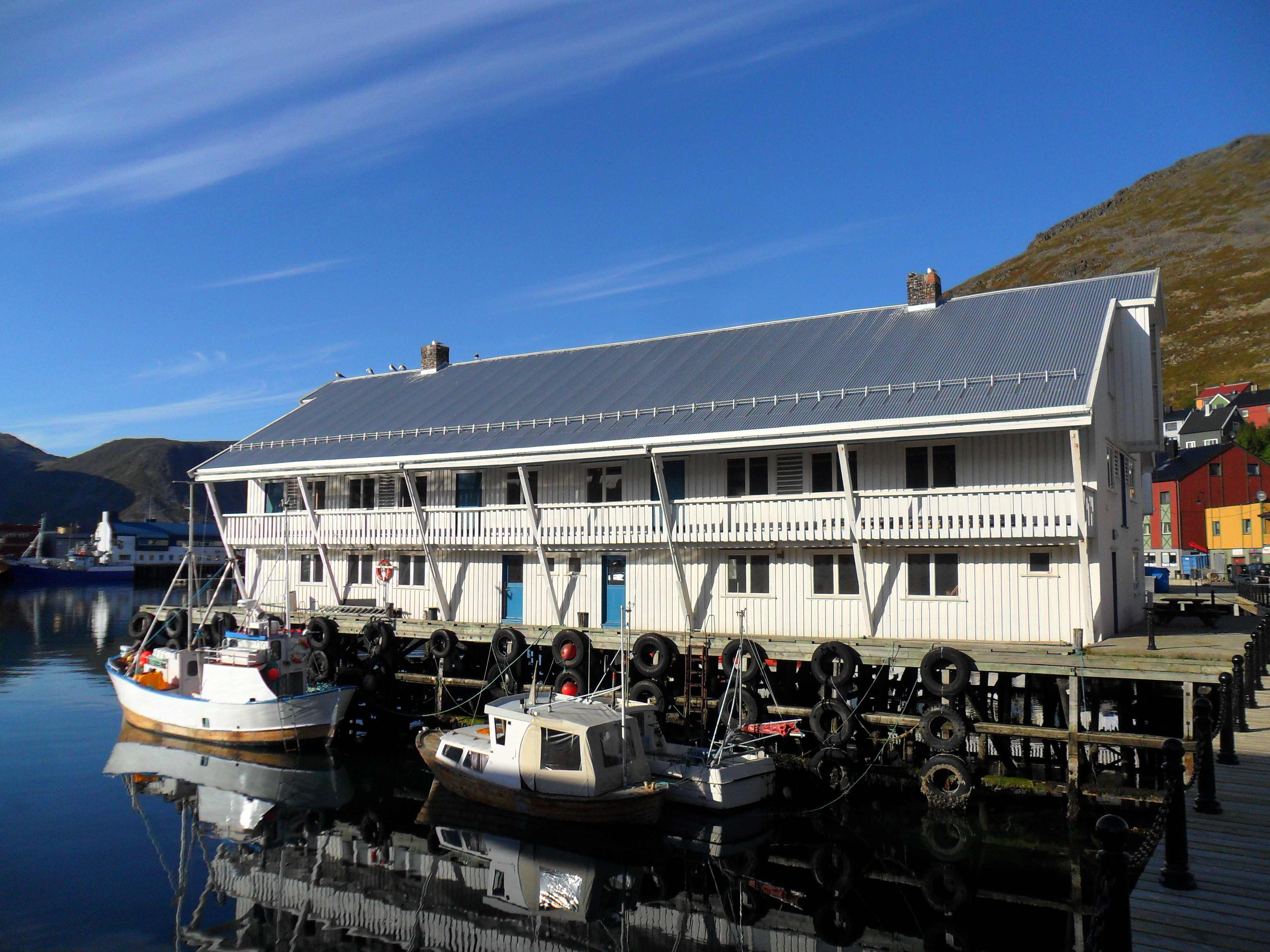 Sjøhus i Honningsvåg, Nordkapp kommune, bygget i årene 1953-1961